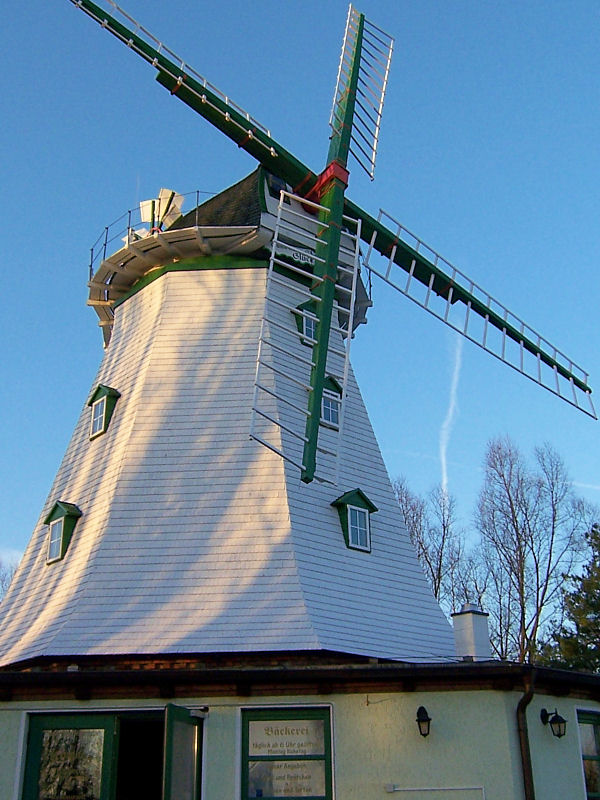 Windmühle Rostock-Dierkow